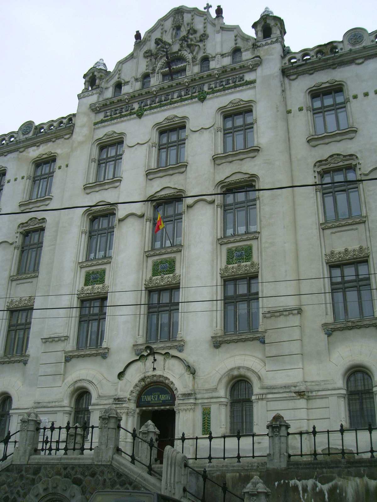 Das Tamasi-Aron-Lyzeum in Székelyudvarhely (Odorheiu Secuiesc, Siebenbürgen).